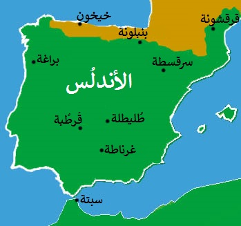 خريطة الأندلُس والبلاد التي افتتحها المُسلمون فيها وفي جنوب الغال.